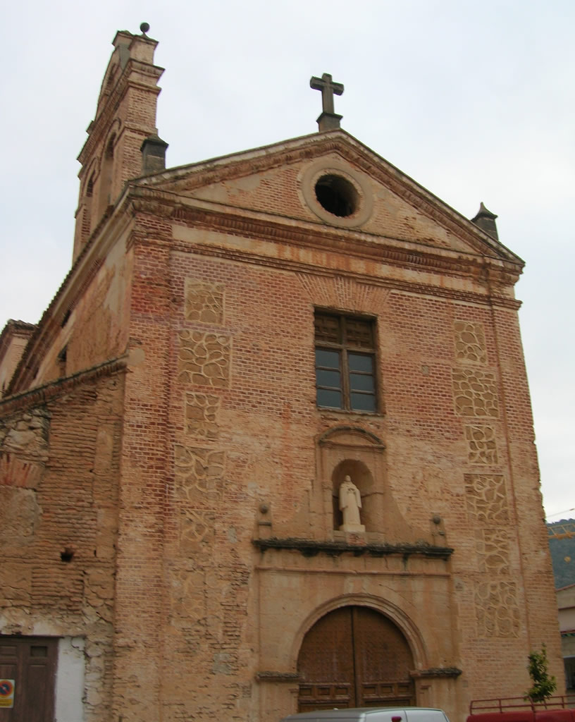 Liétor, Albacete, España, convento de las Carmelitas (siglo XVI). Lietor, Albacete, Spain, Carmelite convent (16th. century). Own picture, given to PD.